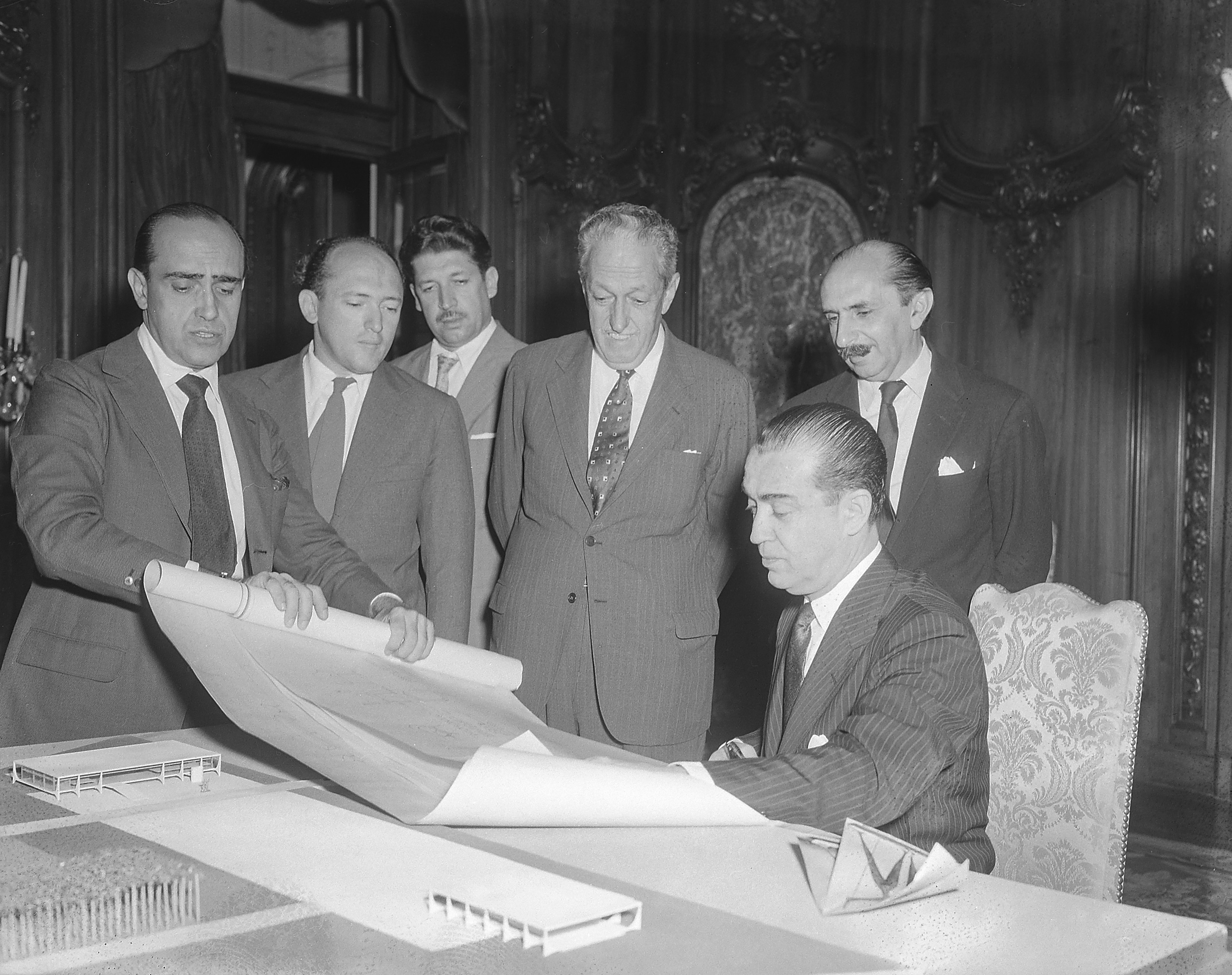 Imagem do Fundo Agência Nacional, do Arquivo Nacional